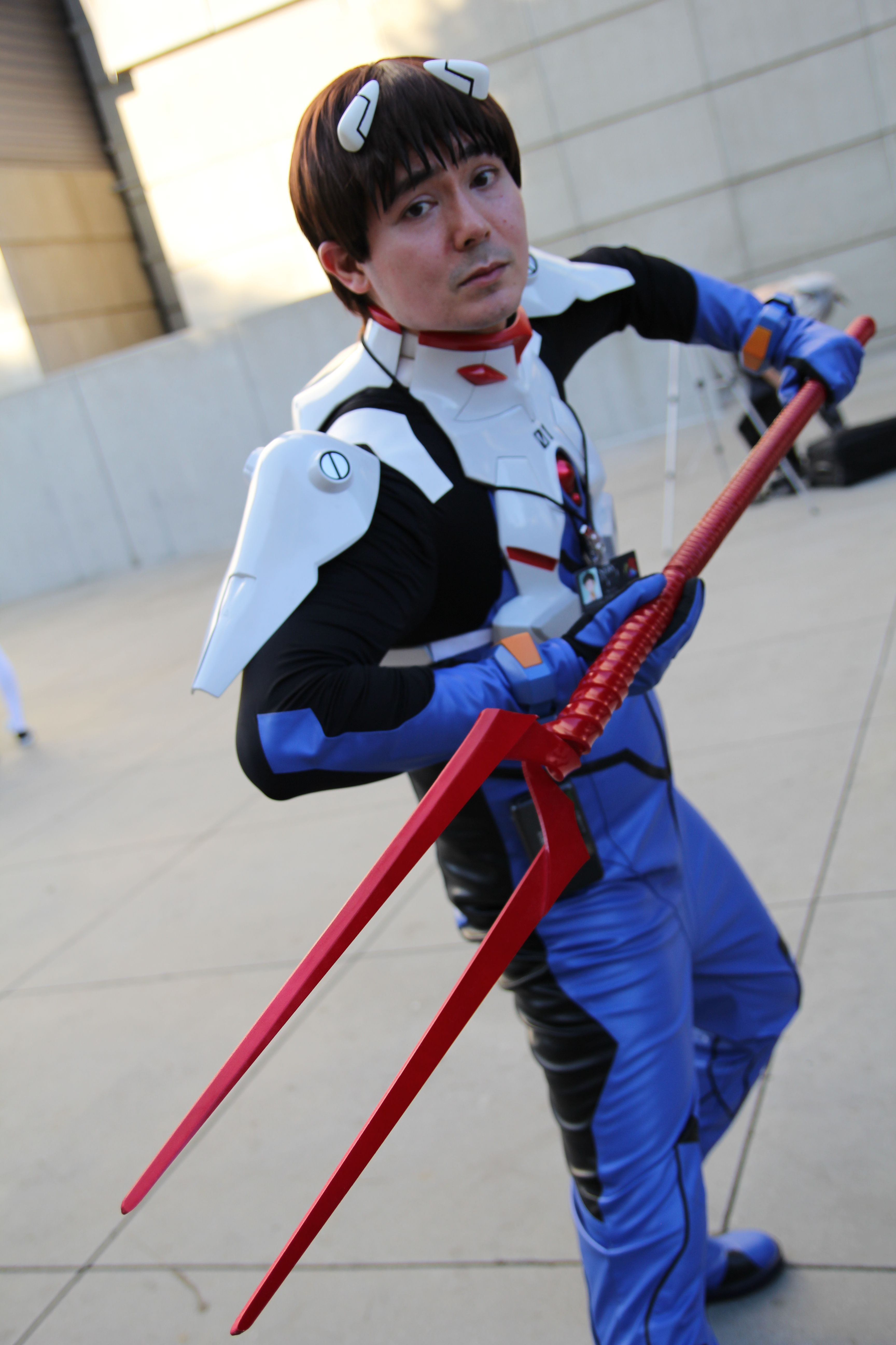 Anime Expo 2016，《新世紀福音戰士》碇真嗣cosplayer。